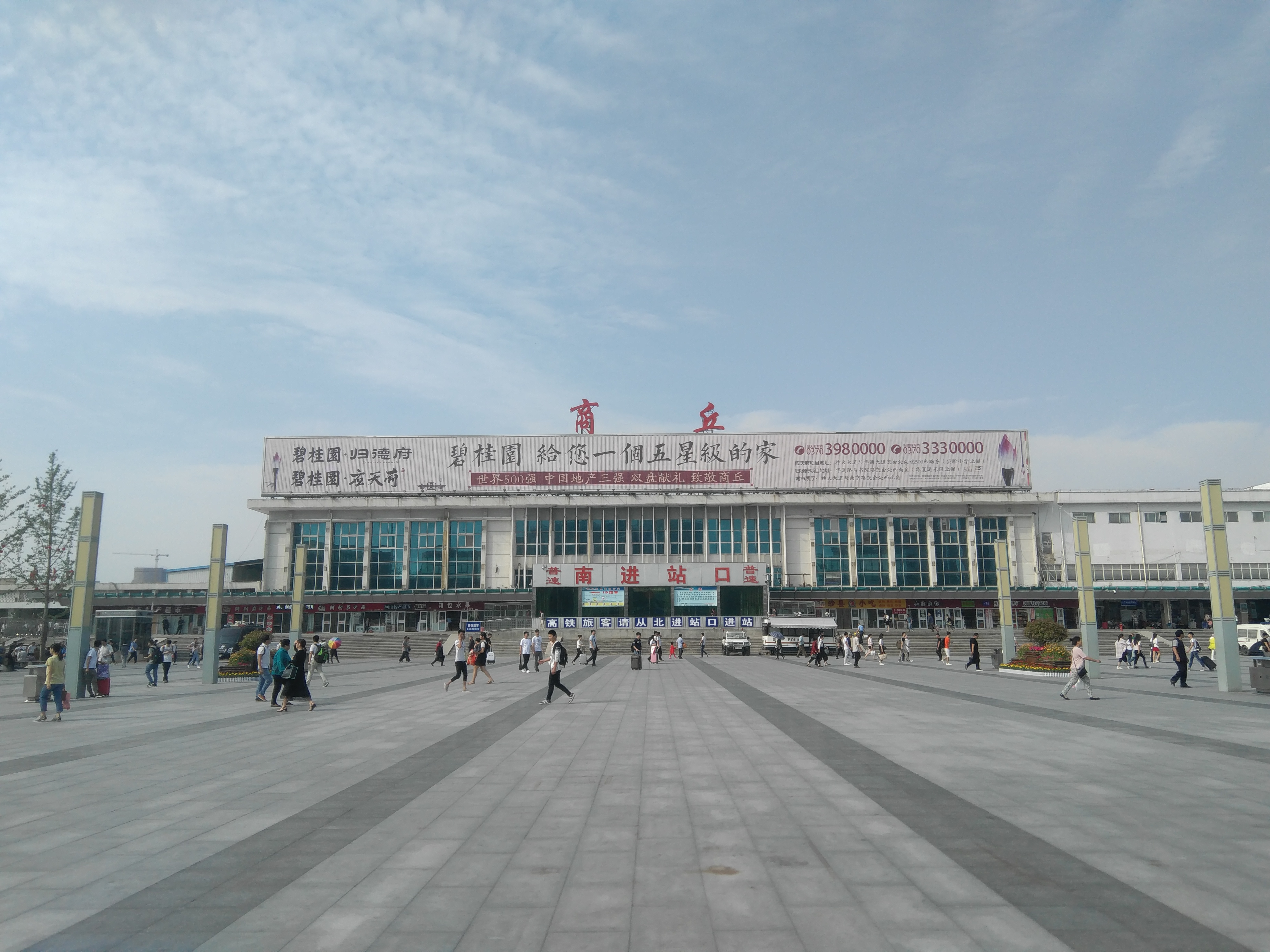 商丘站南站房，2017年5月